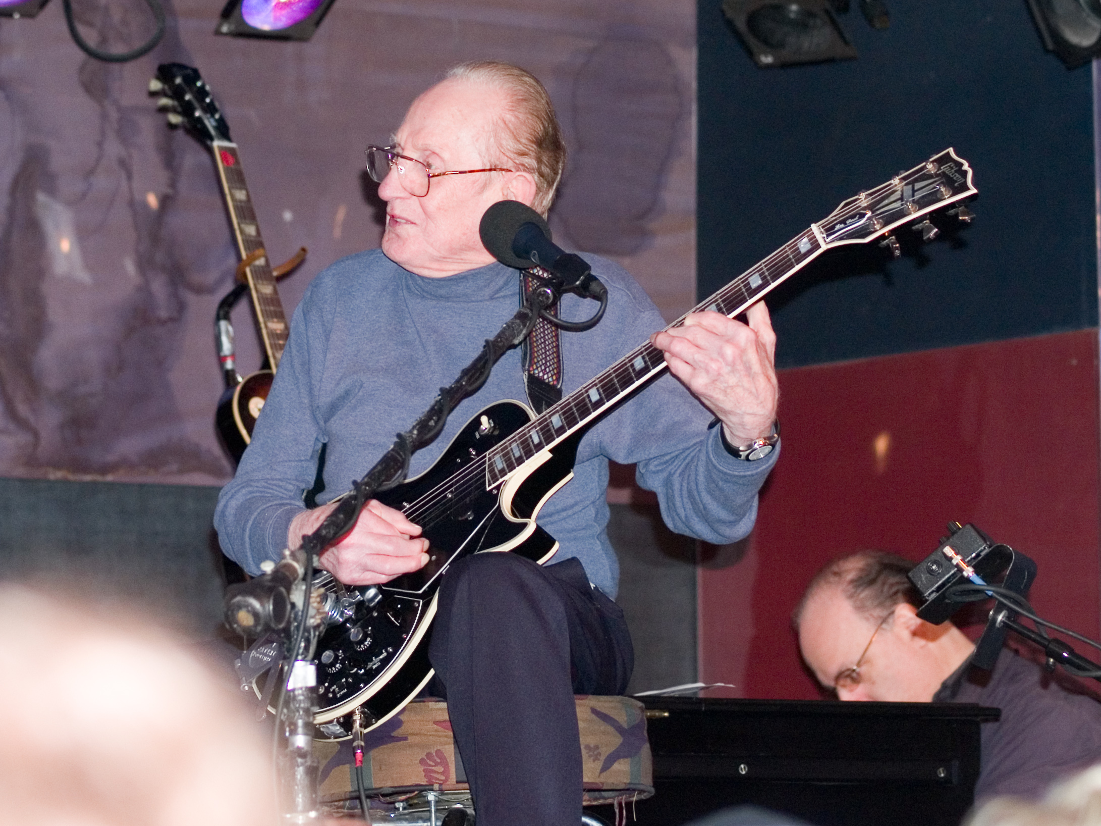 Lester William Polfus (Les Paul) in New York